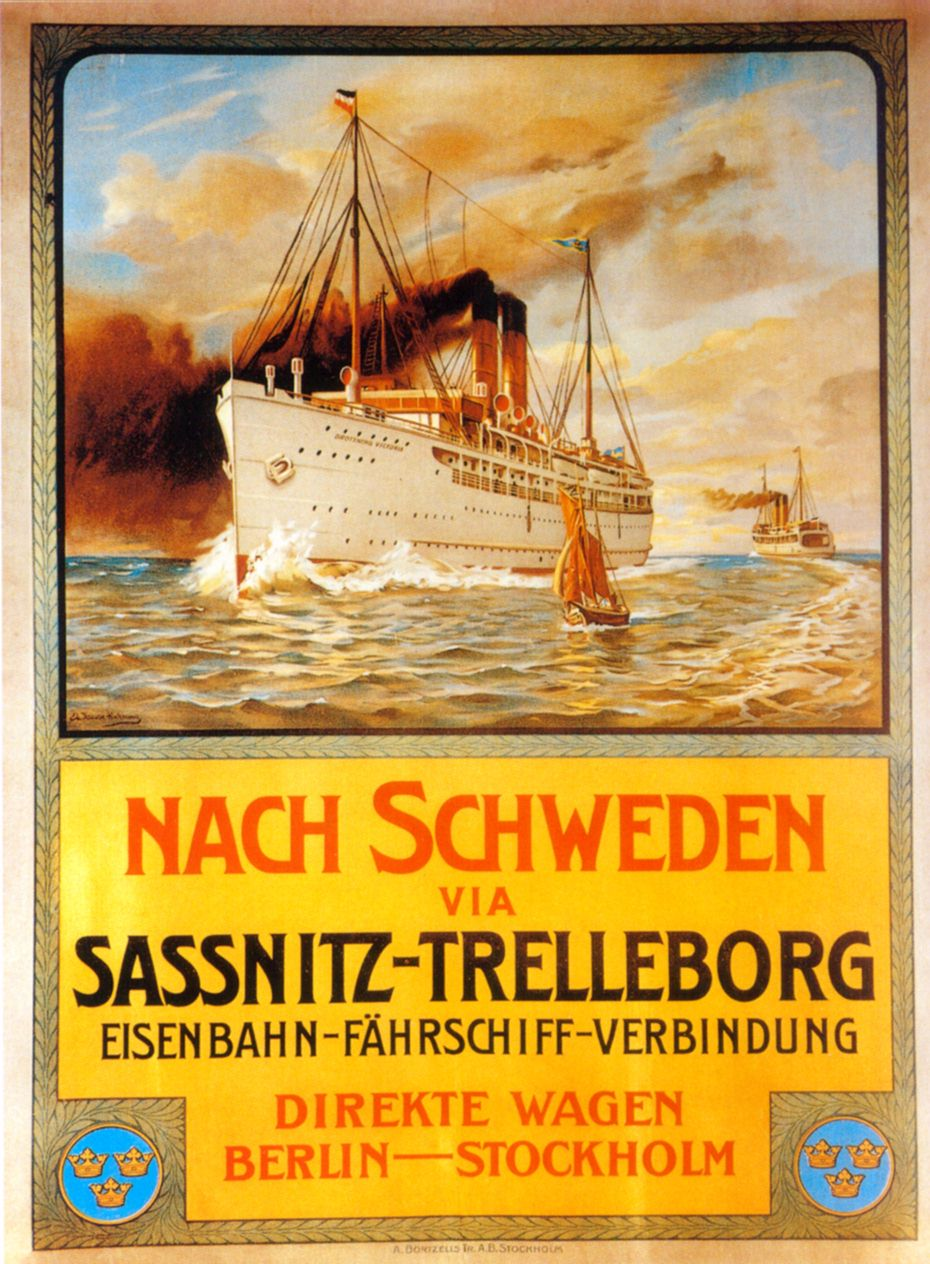 Werbeplakat für die Fährverbindung Saßnitz—Trelleborg. Abgebildet ist das schwedische Fährschiff Drottning Victoria.